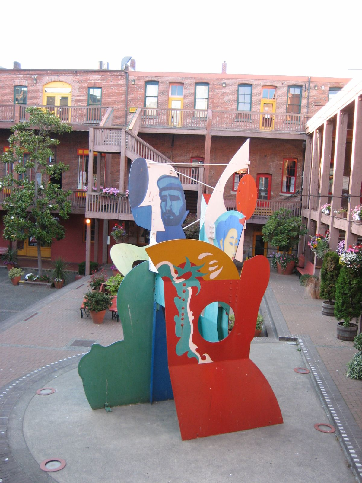 sculpture in Victoria/Canada